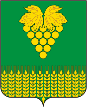 Герб Верхнекубанского сельского поселения, Краснодарский край, Россия.